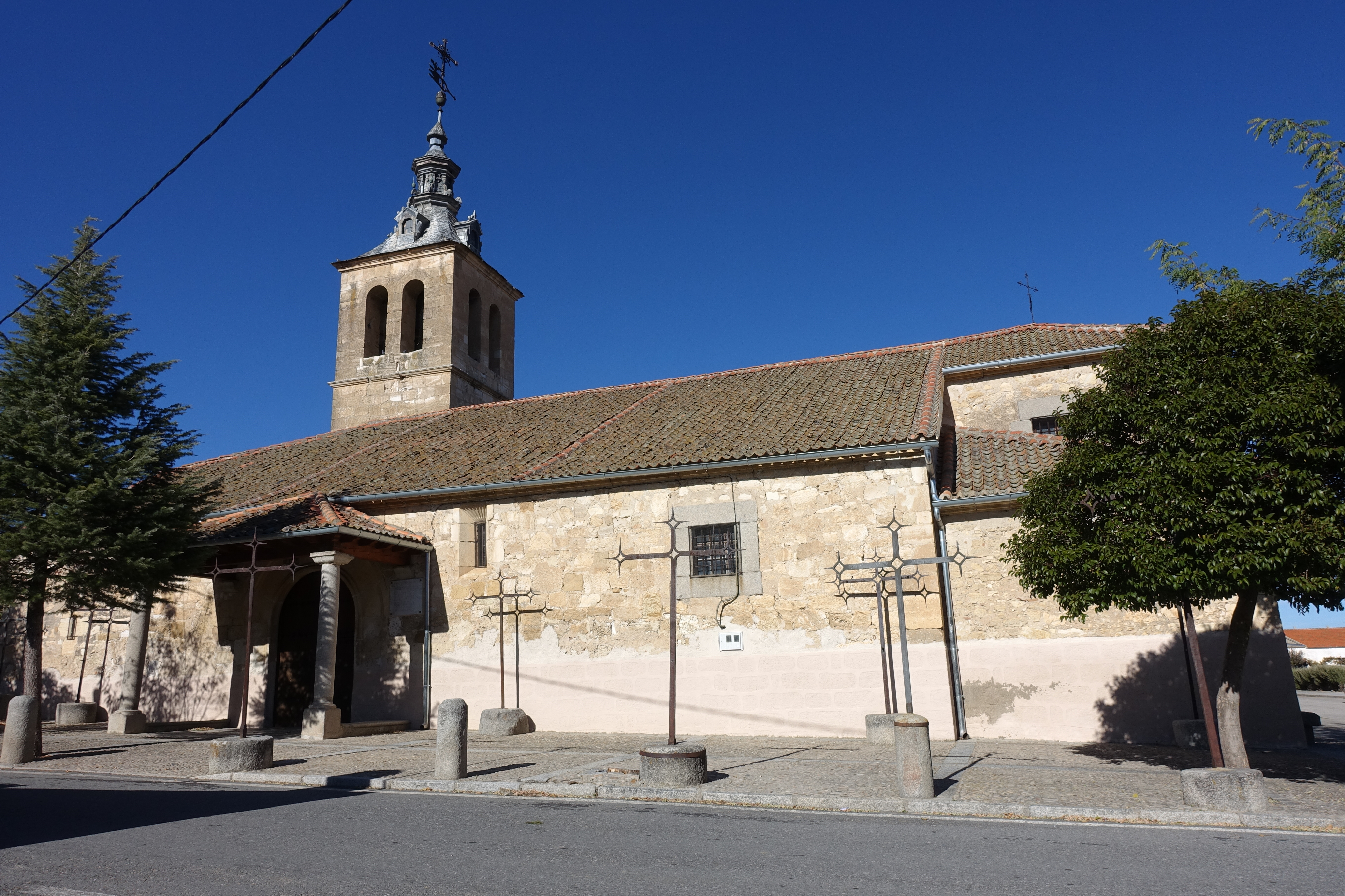 Iglesia de San Juan Evangelista, Marazoleja (Segovia, España).